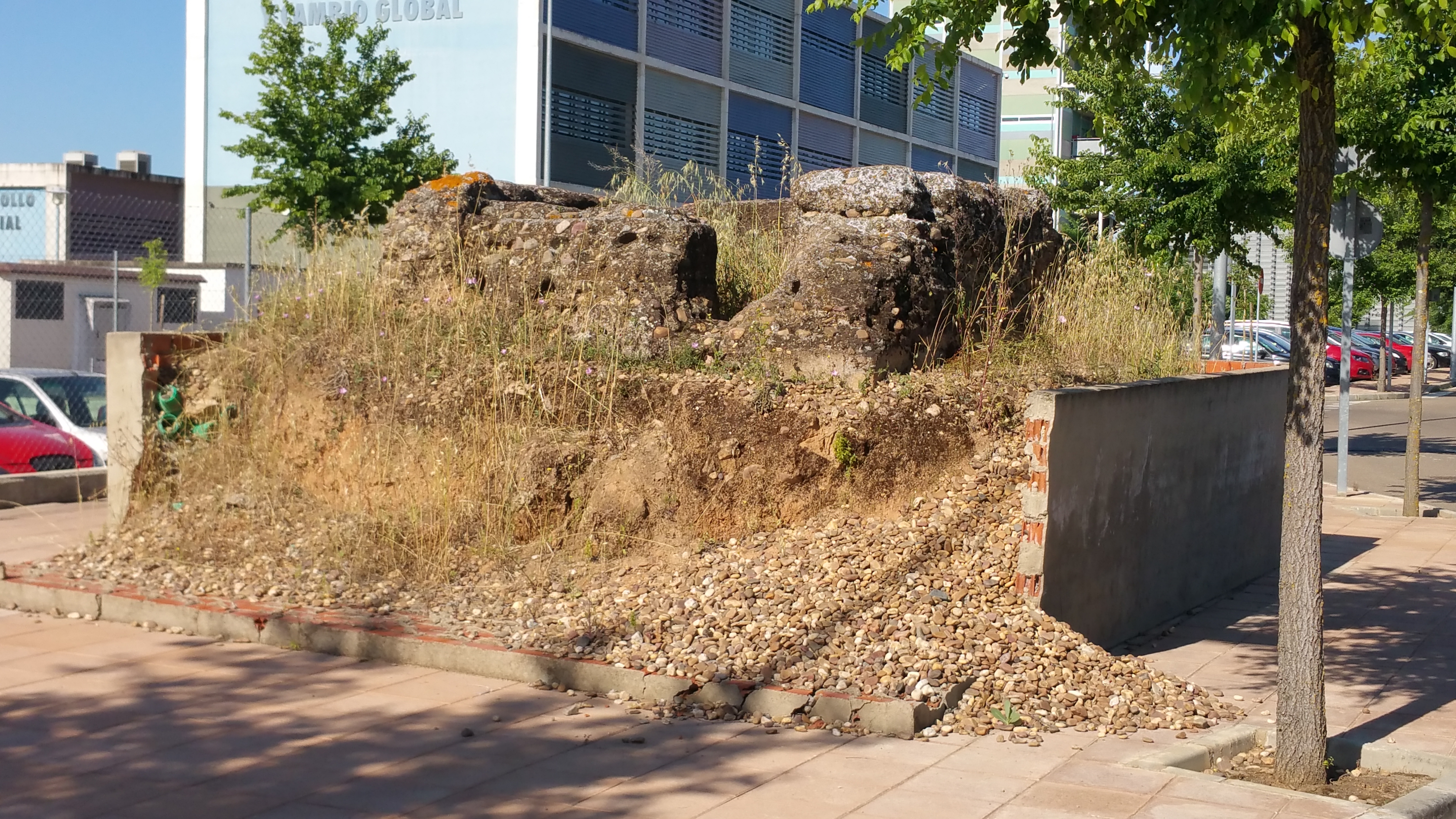 Ruinas Fuerte de Pardaleras